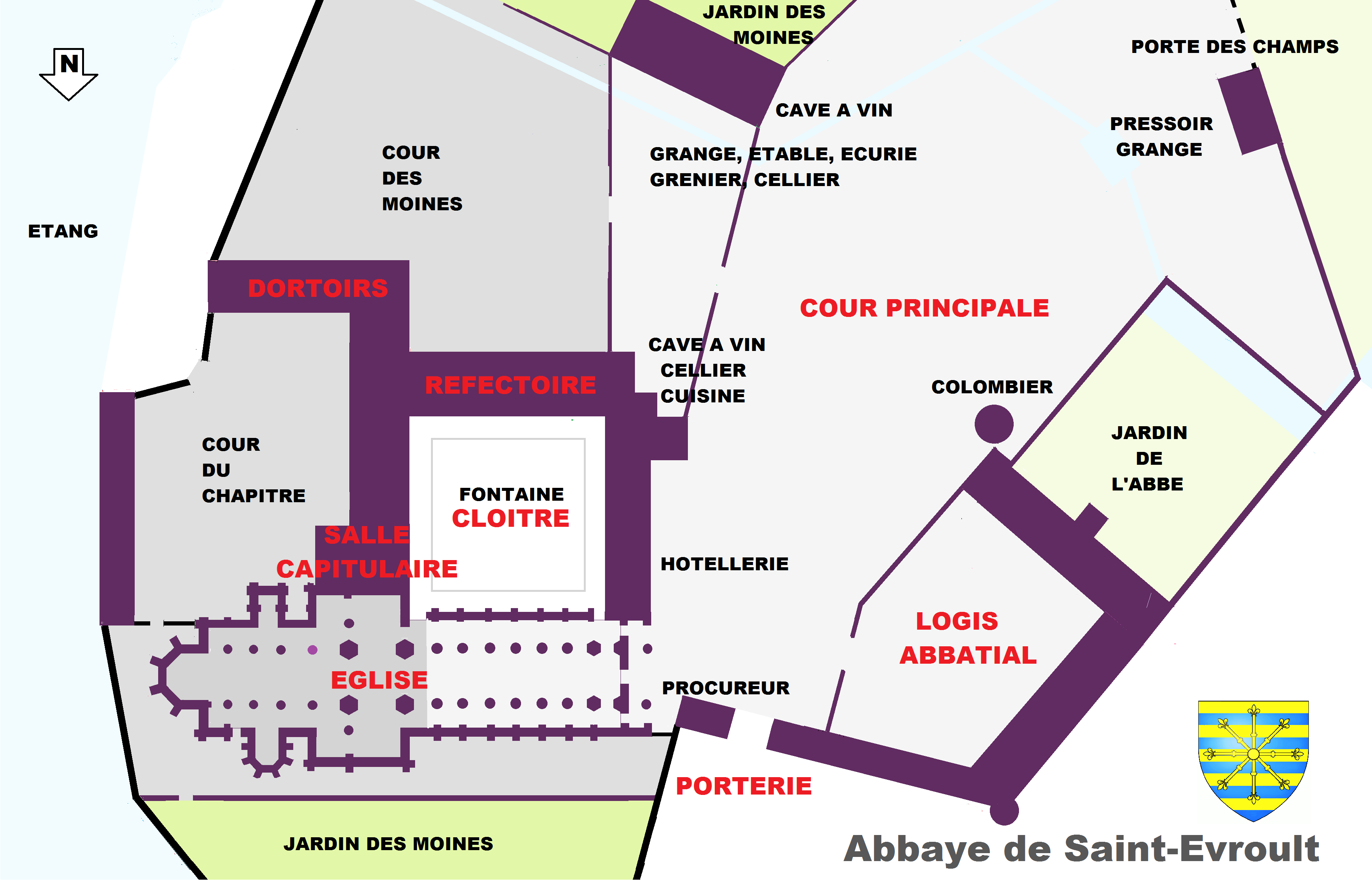 Abbaye de Saint-Evroult, Orne, Plan